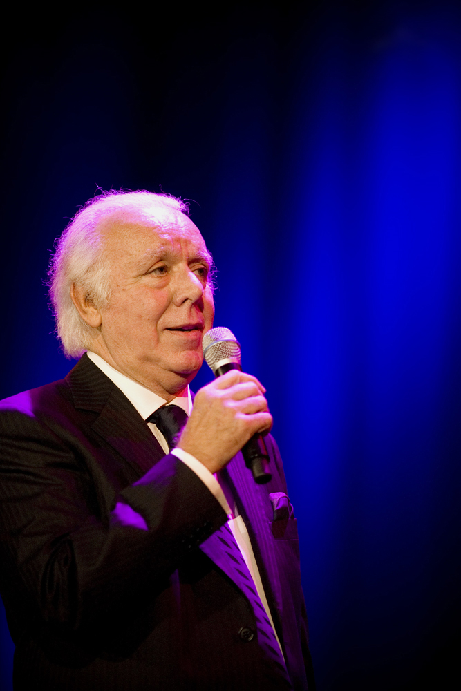 Carlos do Carmo. 08 Novembro 2007, Pavilhão Atlântico em Lisboa